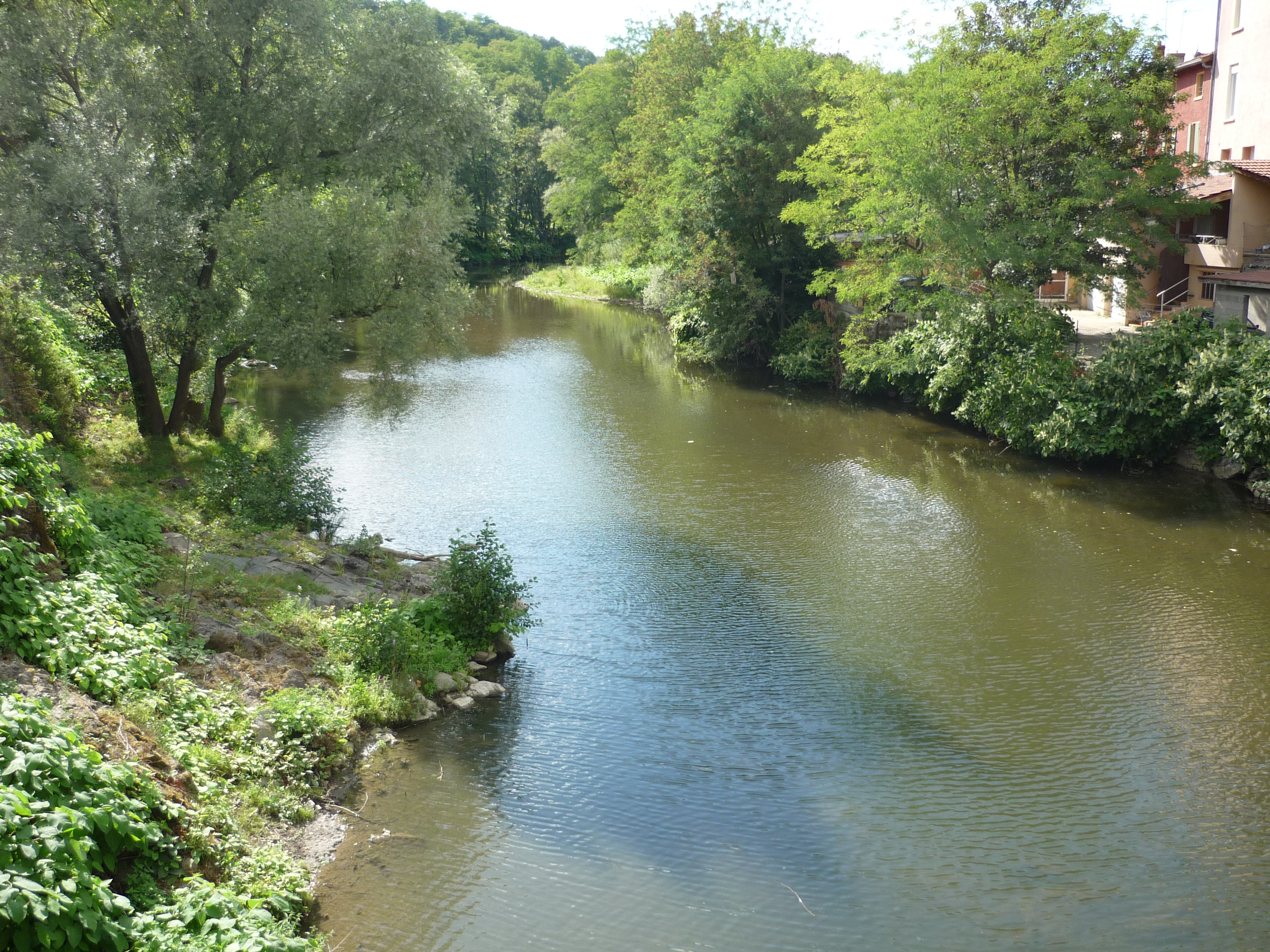 Vue de la rivière Azergues à Lozanne. Il s'agit d'une vue à l'entrée nord de la ville.